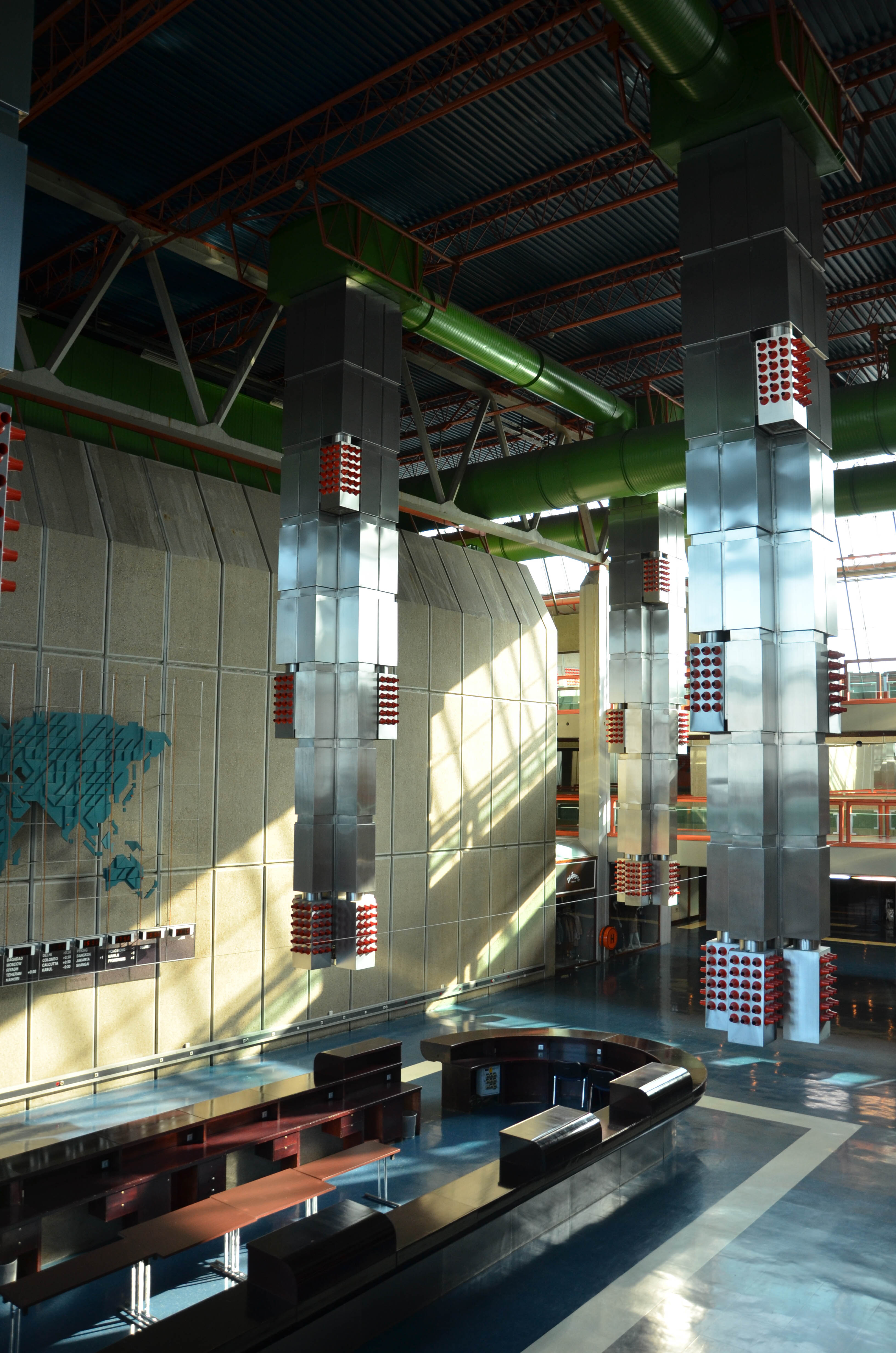 Innenraumaufnahme der Empfangshalle des Kongresszentrums Sava Centar in Belgrad.